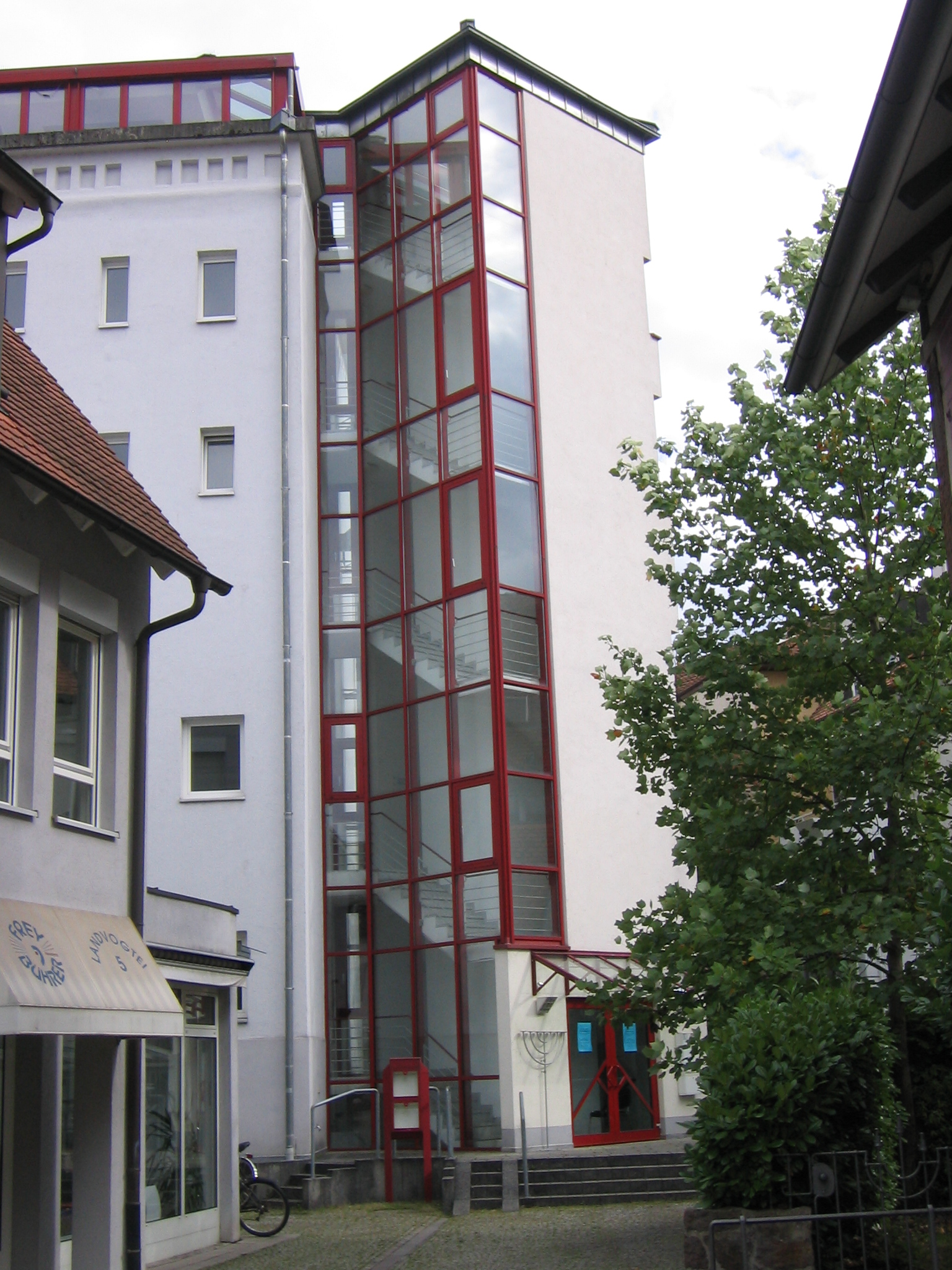 Synagoge der jüdischen Gemeinde in Emmendingen